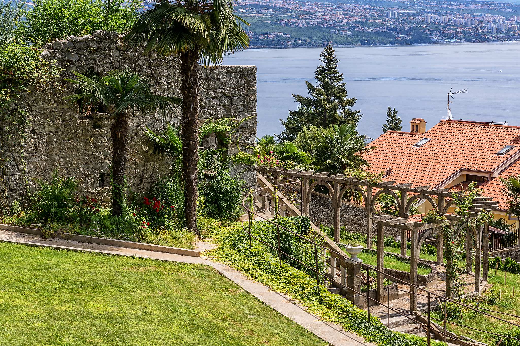 Unutar Amerikanaskog vrta u Opatija